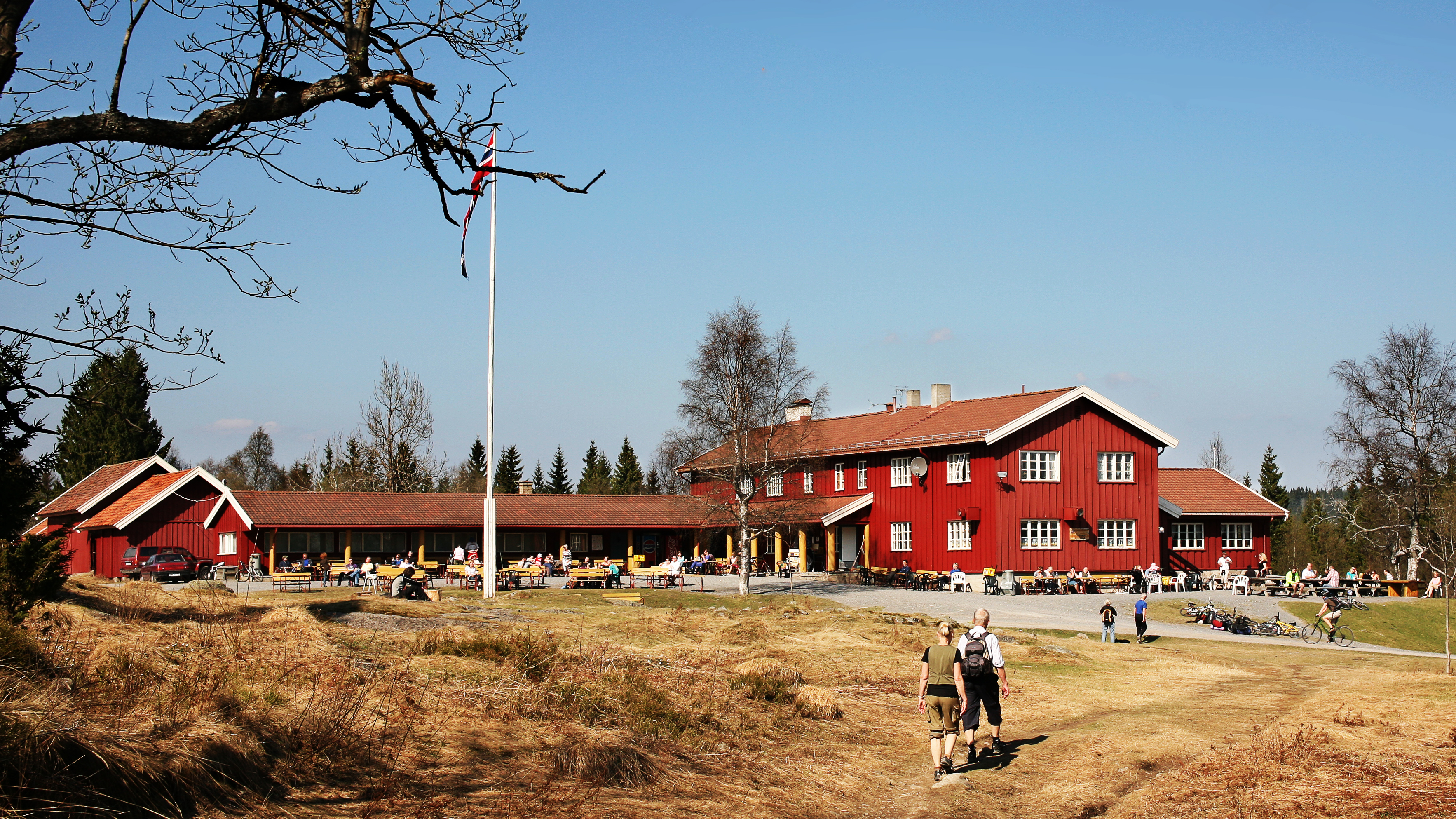 Ullevålseter ligger i Nordmarka og er foruten et betjent serveringsted, et knutepunkt i Nordmarka med turveier, skiløyper og stier